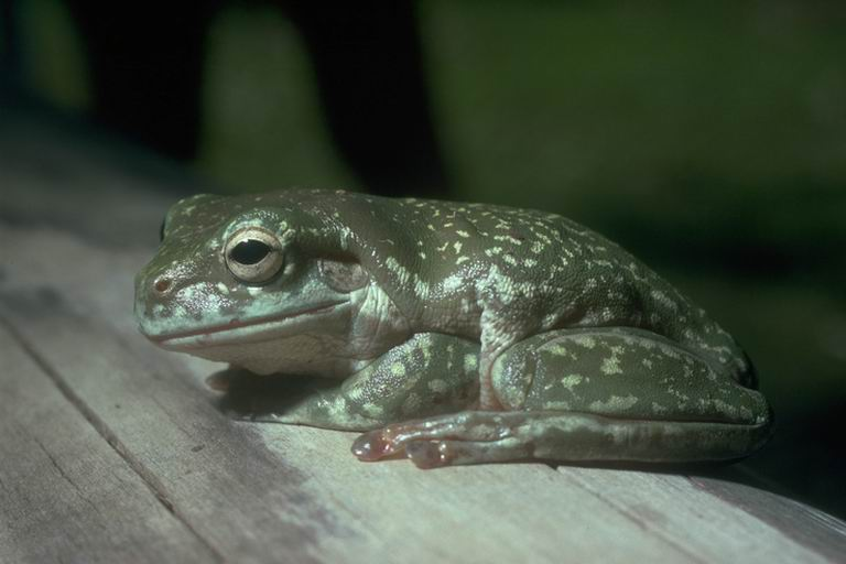 Litoria caerulea